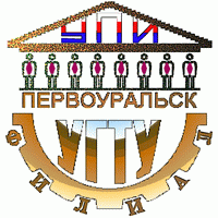 Эмблема филиала УГТУ-УПИ в г.Первоуральске